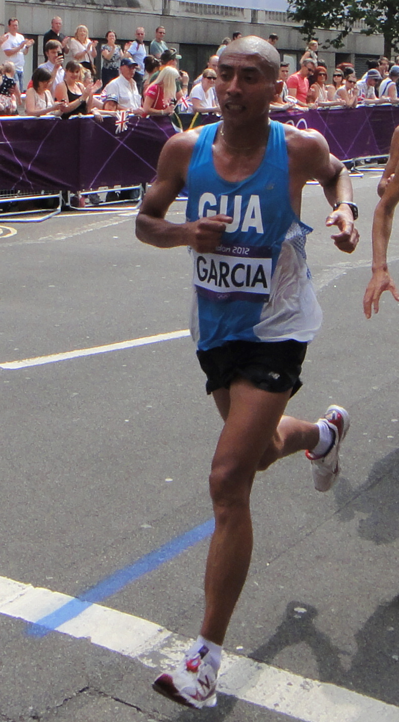 Jose Amado Garcia (Guatemala) - London 2012 Men's Marathon